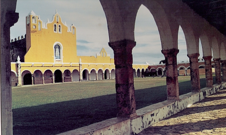 Arcada principal del atrio del convento franciscano (Siglo XVI) de Izamal, Yucatán, México